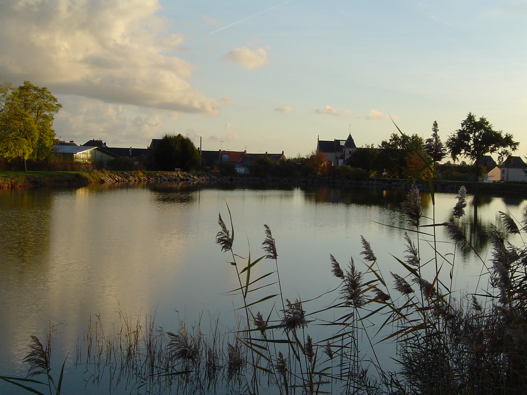 Étang des Cerqueux (commune de Maine-et-Loire, en France) au crépuscule.